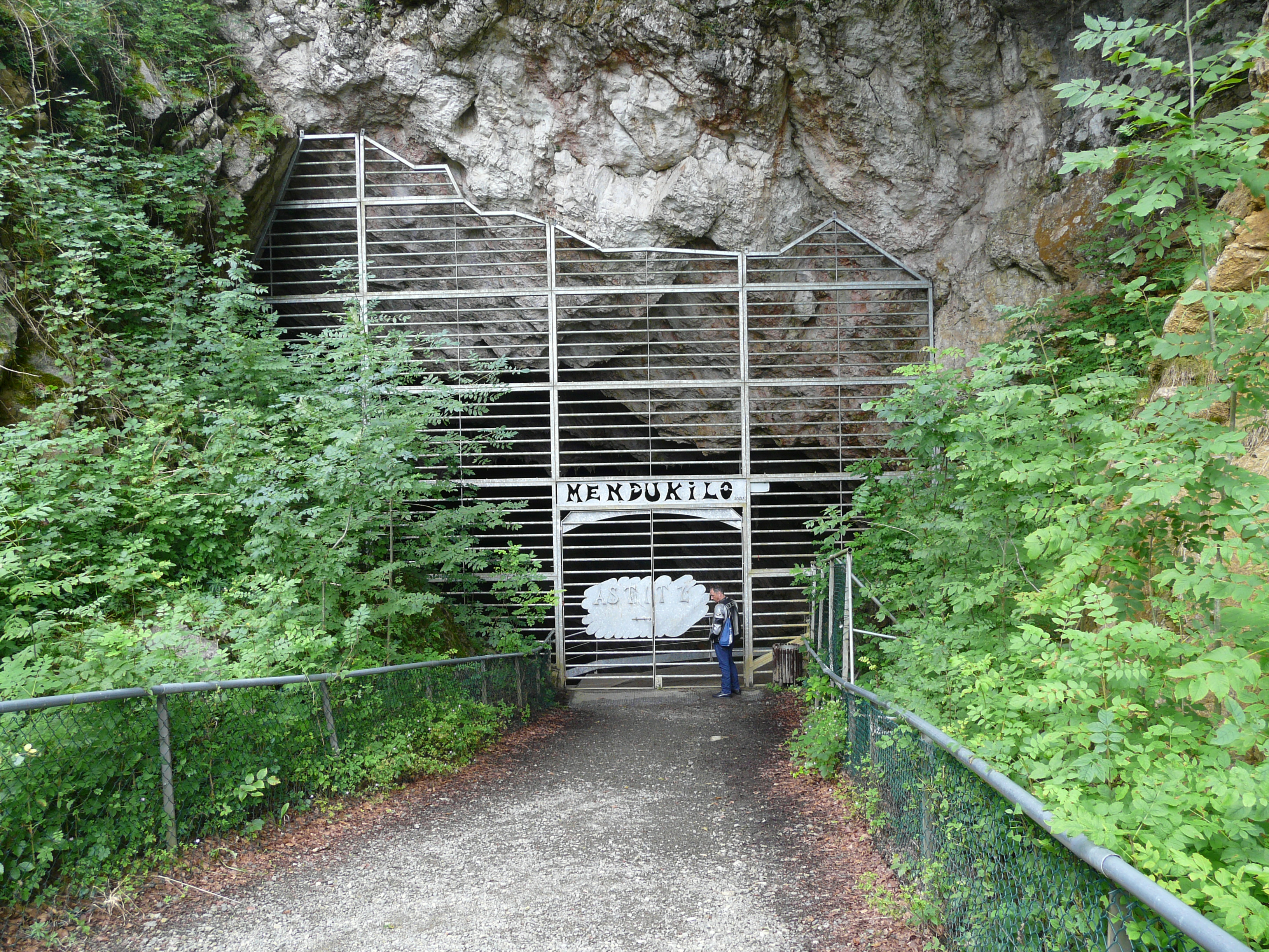 Cova de Mendukilo. És una cova amb cinc sales, tres de les quals estan adaptades per la visita turística. Les fotos estan fetes en una visita guiada.